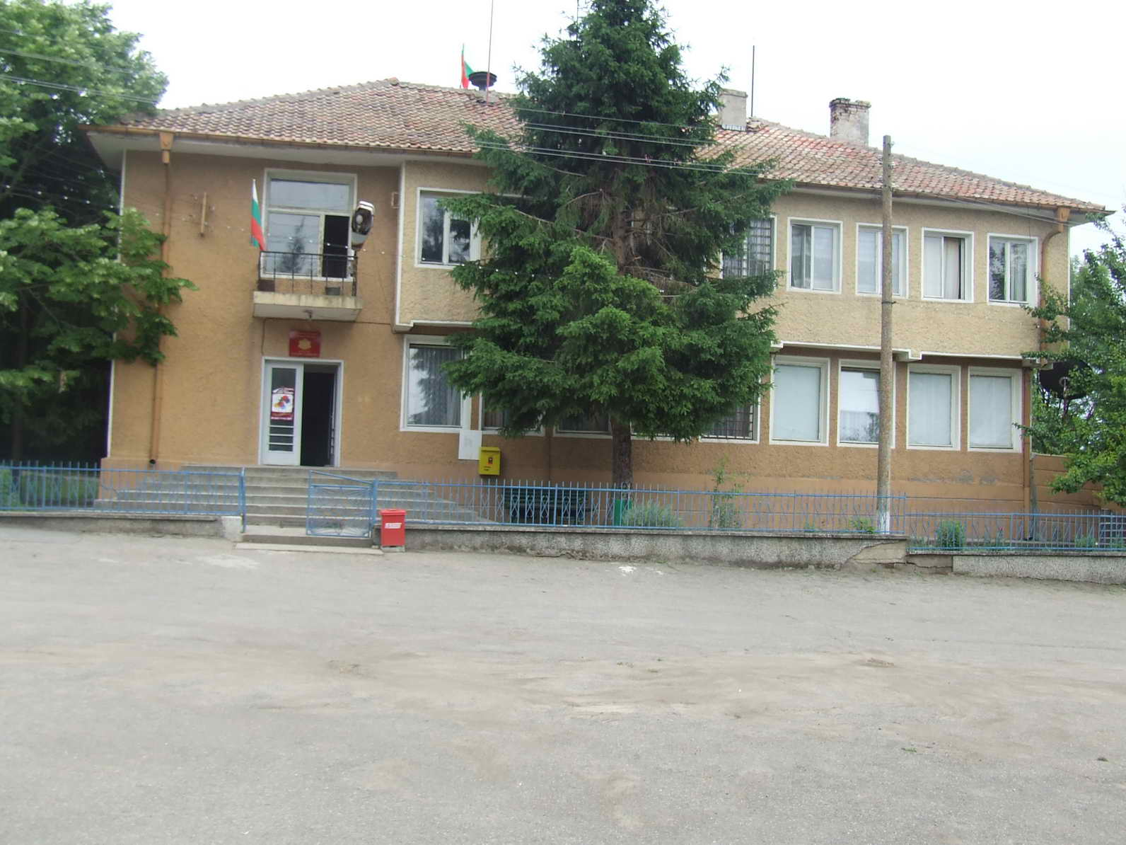 Сградата на кметството на село Захари Стояново, Поповско - 2007 год.